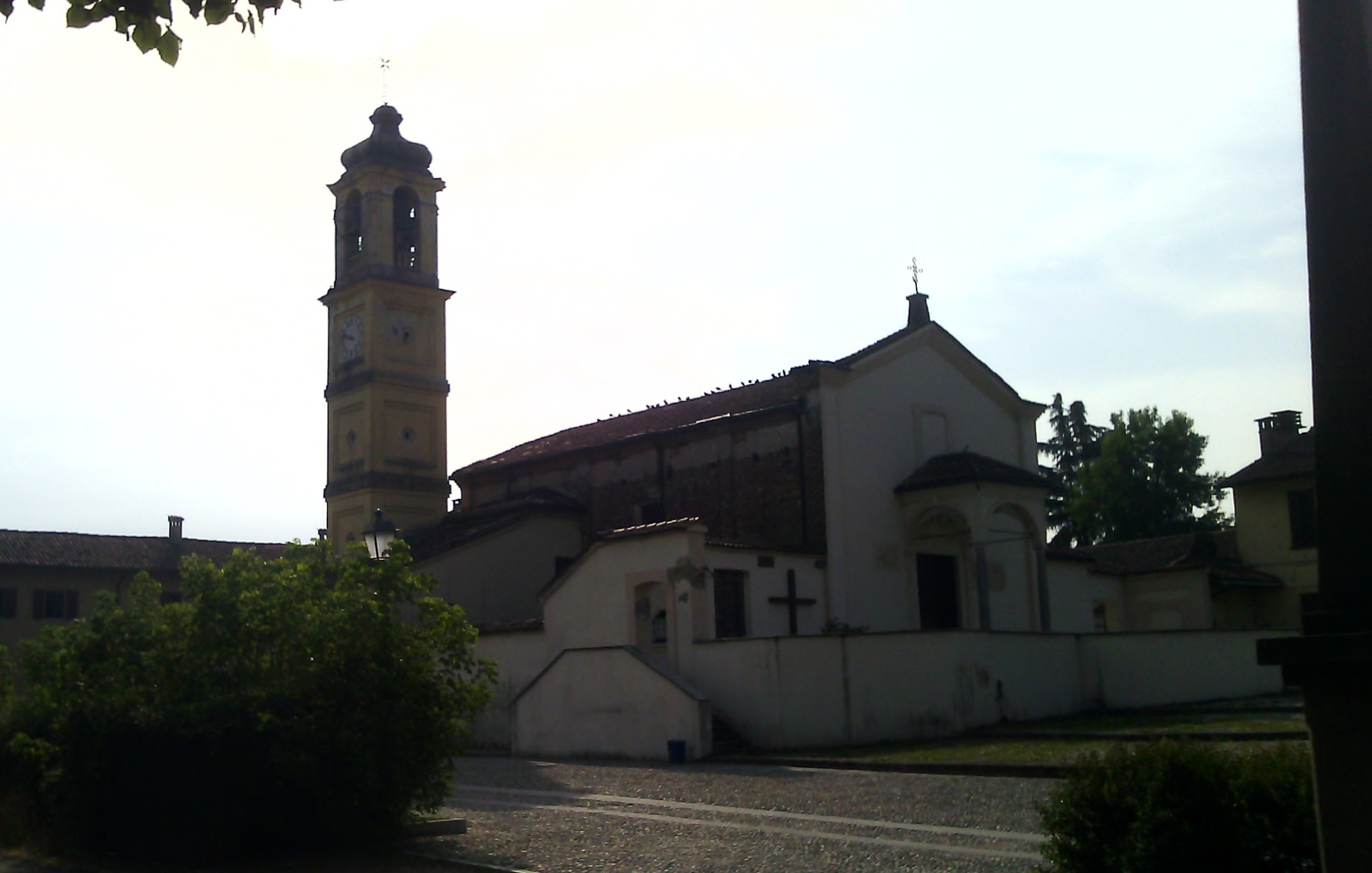 Chiesa di Fallavecchia, frazione di Morimondo (MI)